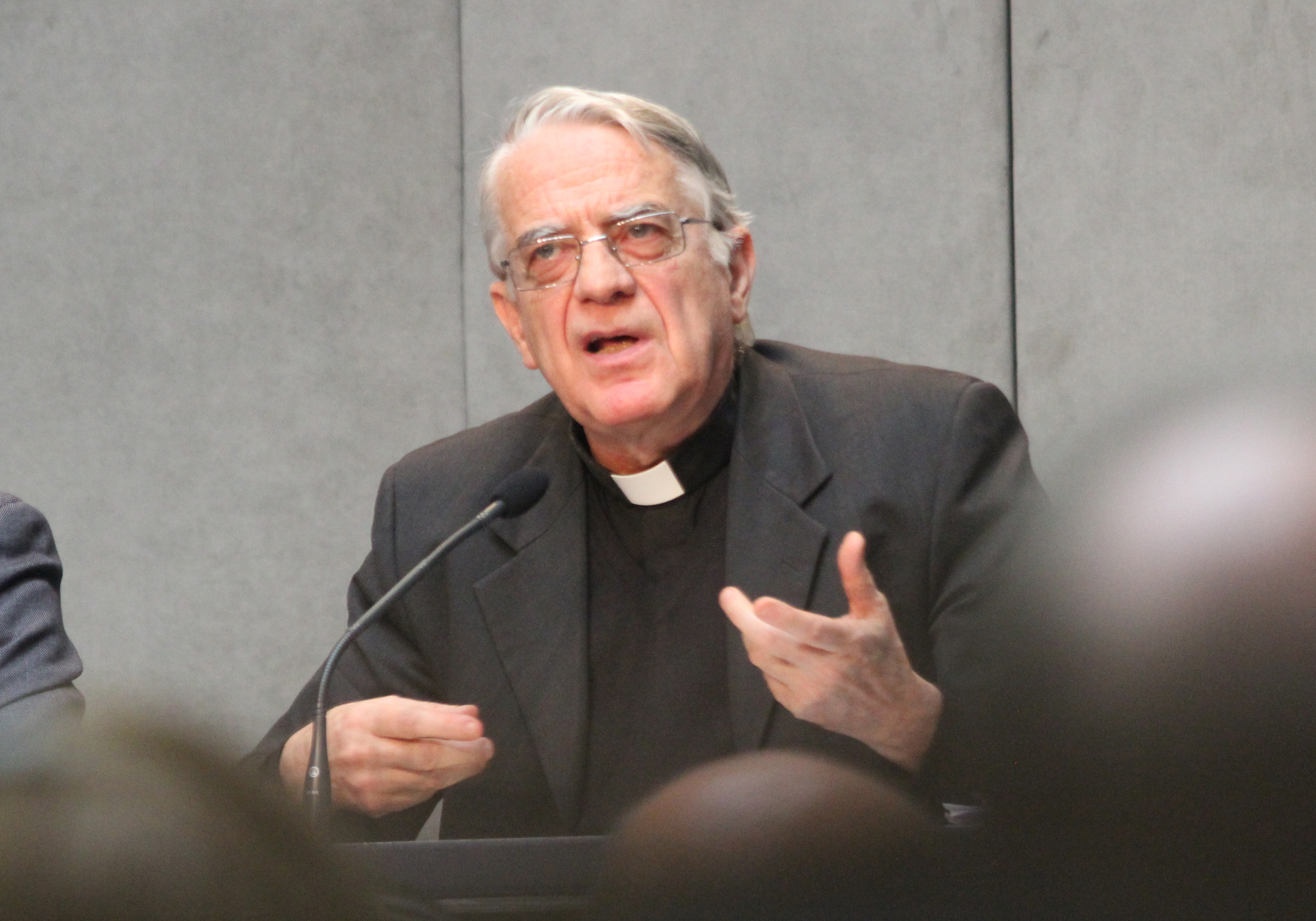 Federico Lombardi, portaveu de la Santa Seu, durant una conferència a Roma el 2014.